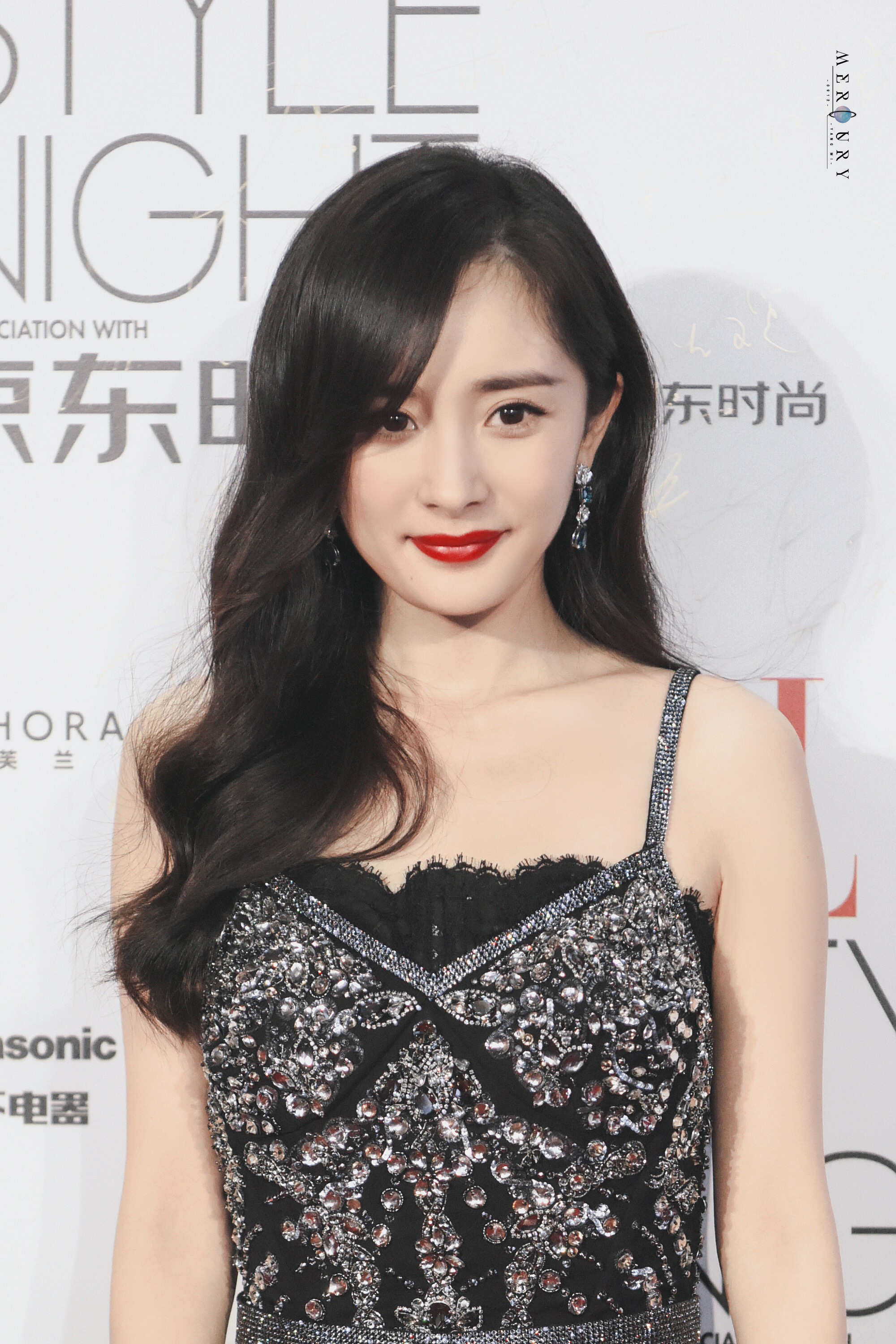 中文（中国大陆）: 2018年9月6日，杨幂出席ELLE30周年风尚大典